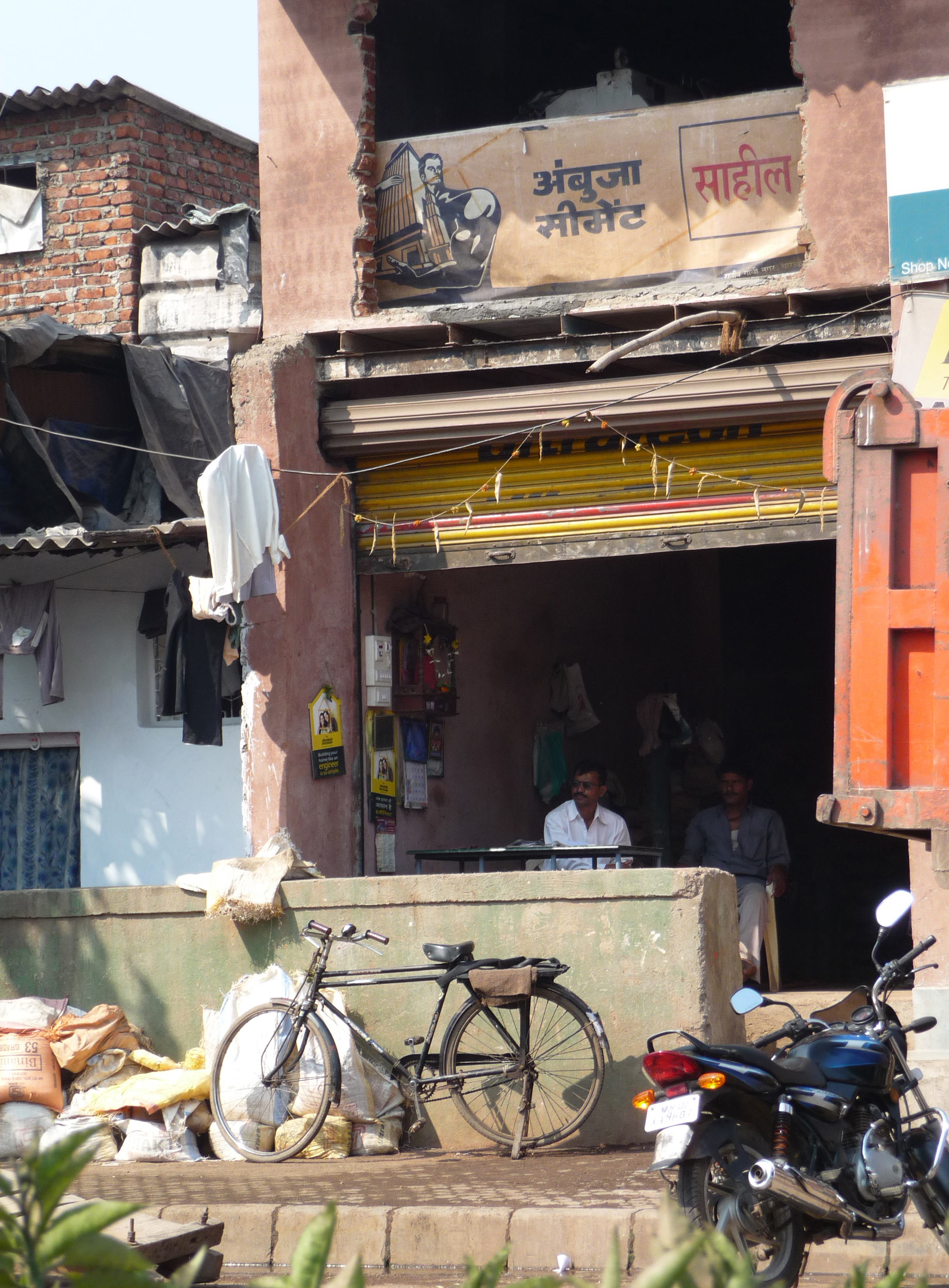 Mumbai